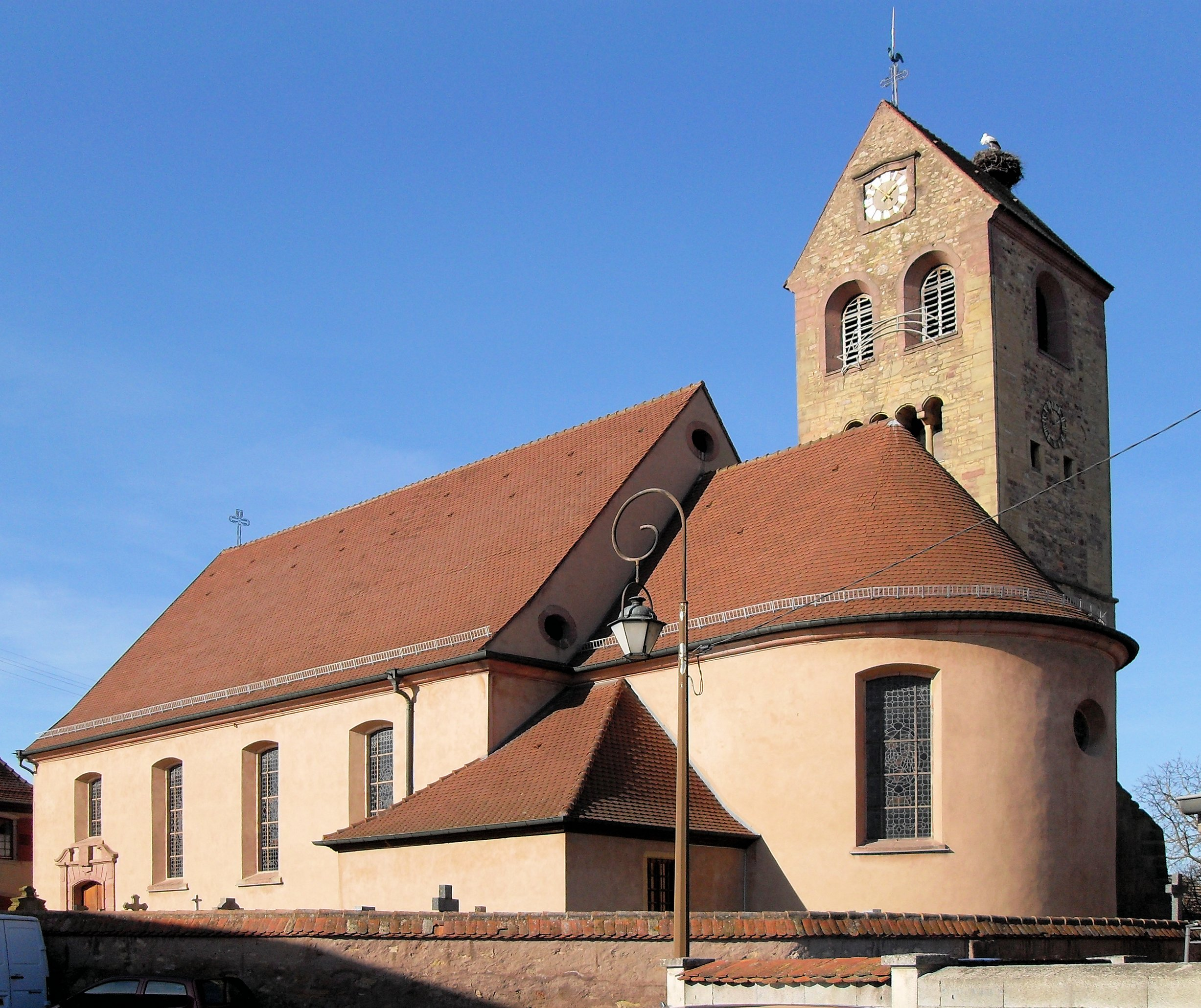 L'église Saint-Pierre et Saint-Paul à Meyenheim